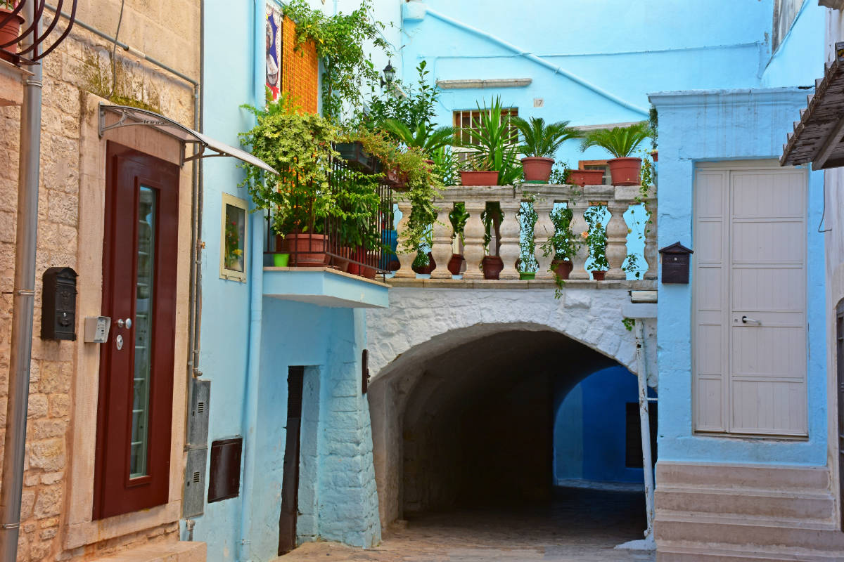 Arco delle Ombre monumento di Casamassima il Paese Azzurro